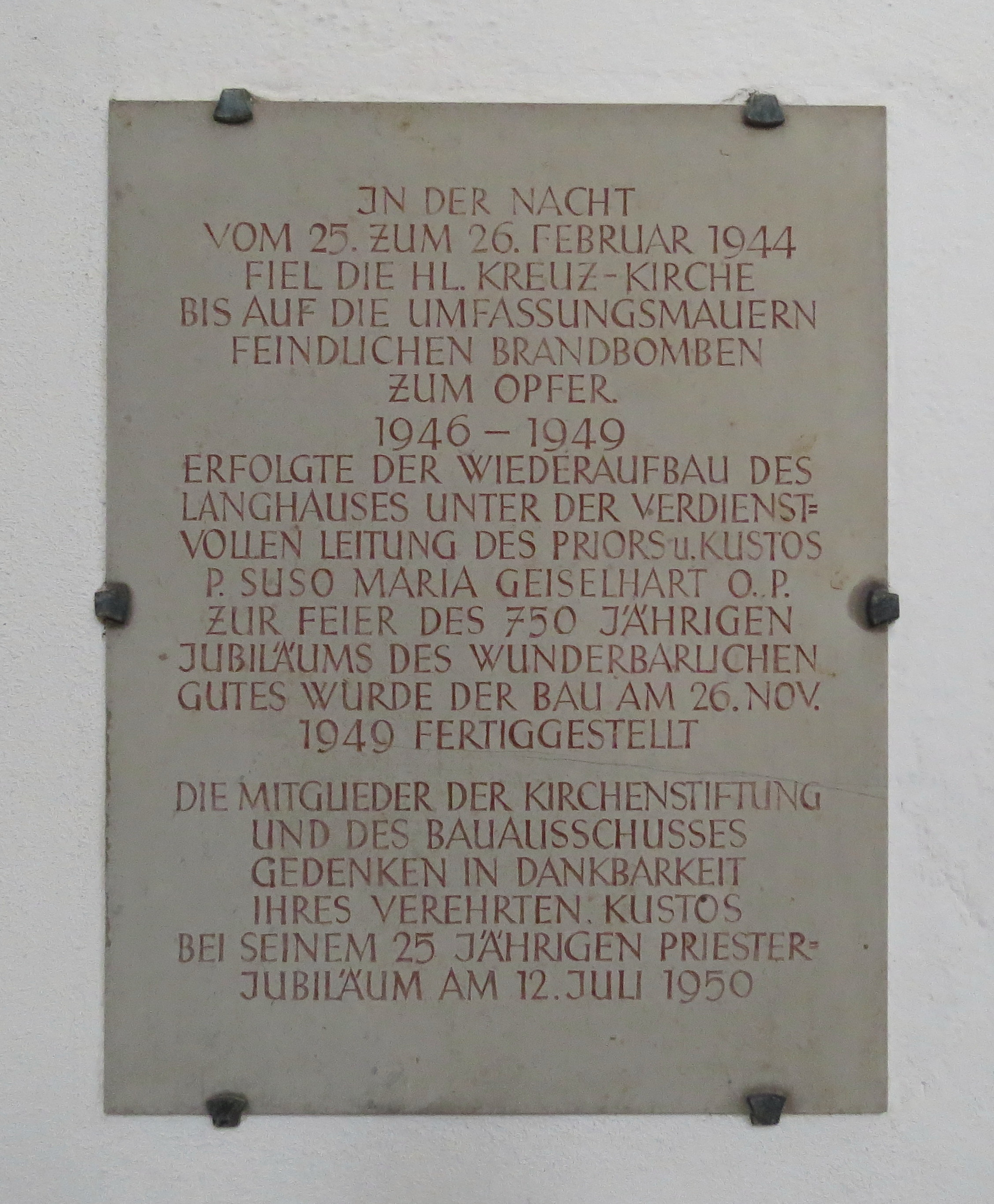 Inschrift über die Zerstörung und den Wiederaufbau der katholischen Heilig-Kreuz-Kirche Augsburg, aus dem Jahr 1950.